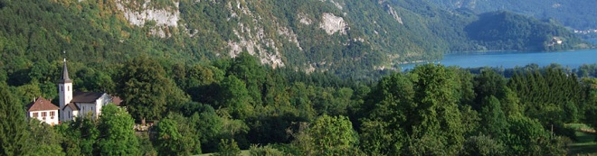 Vue de l'église et du lac